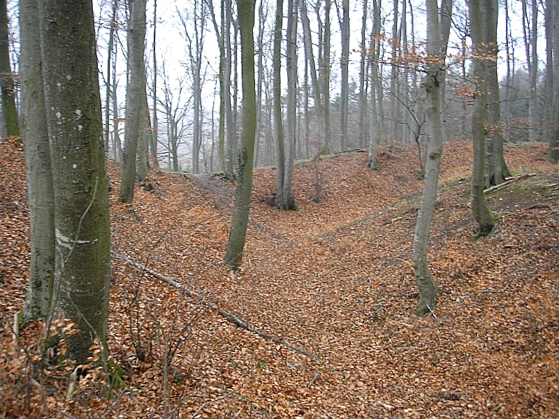 Frühmittelalterlicher Burgstall Purk (Gemeinde Moorenweis, Landkreis Fürstenfeldbruck, Oberbayern). Die Südwestseite der Wallanlagen. Eigene Aufnahme, Jan. 2008 / Early Middle Ages castle Purk near Moorenweis, Upper Bavaria, Germany. South western part of the fortifications. Own photo, Jan. 2008